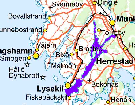 Karta över Gullmarsfjorden med omgivningar. Fjorden är markerad i lila.